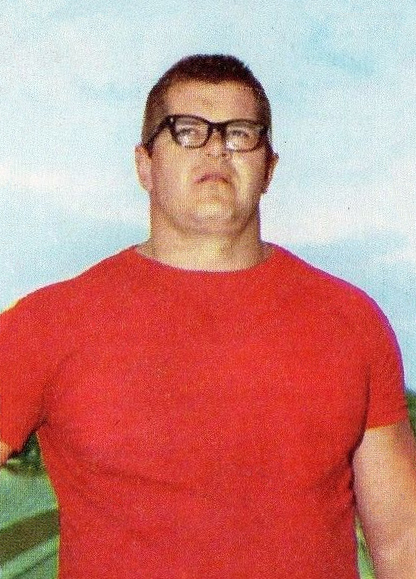 CAMPIONI dello SPORT 1969/70-n.75- GUSHCHIN - URSS -ATLETICA